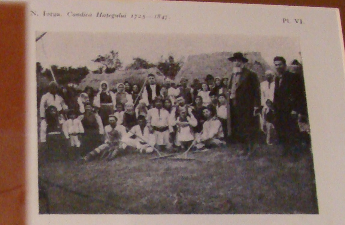 Biserica "Sf. Mare Mucenic Gheorghe", sat SÂNPETRU; comuna SÂNTĂMĂRIA-ORLEA